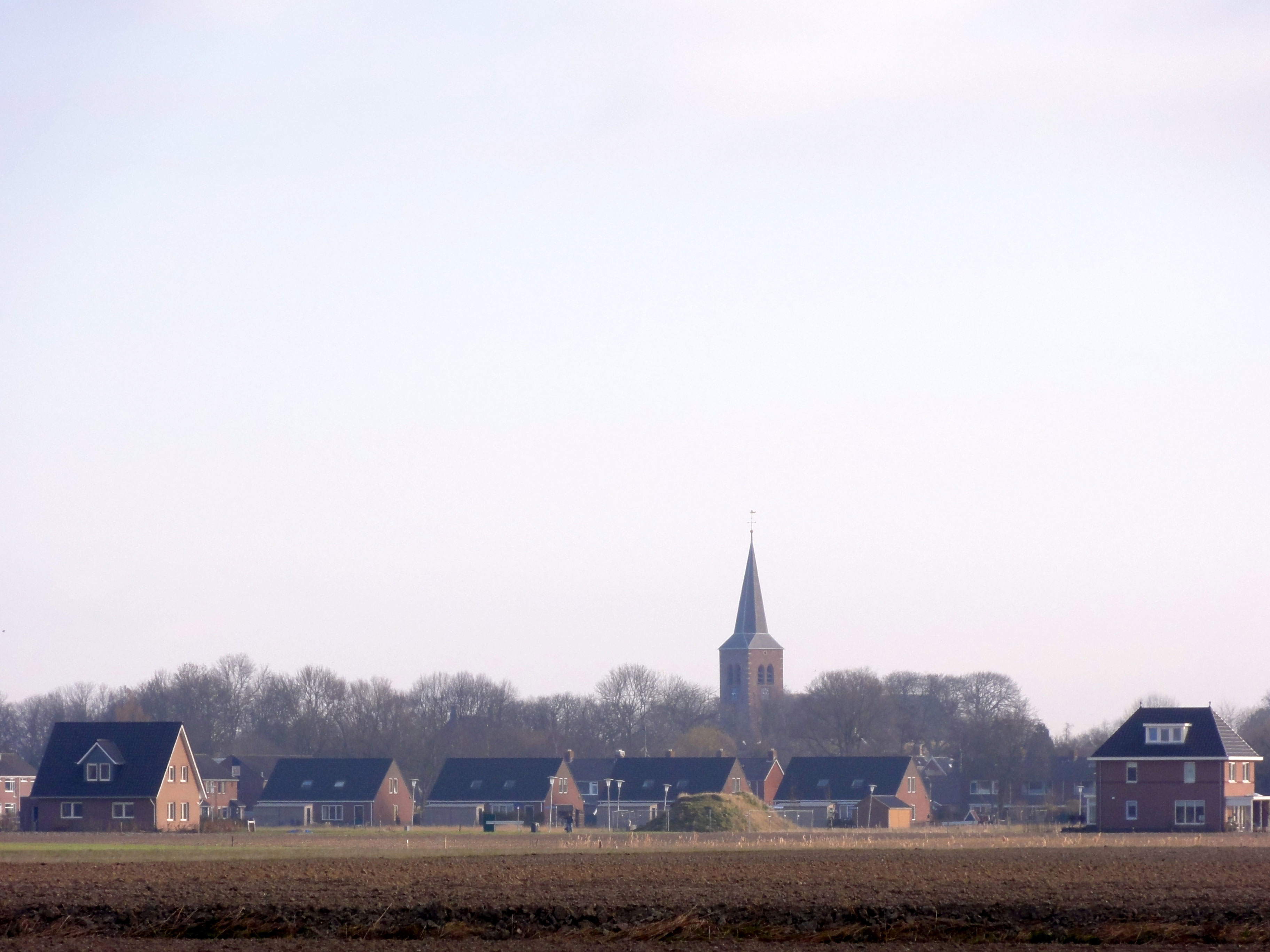 Zicht op Warffum vanaf het Warfummerbos